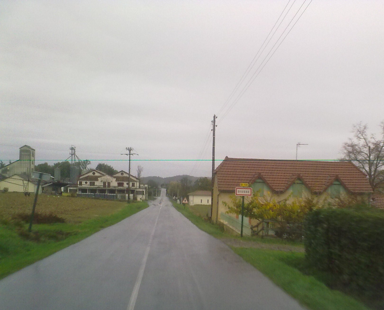 Diusse